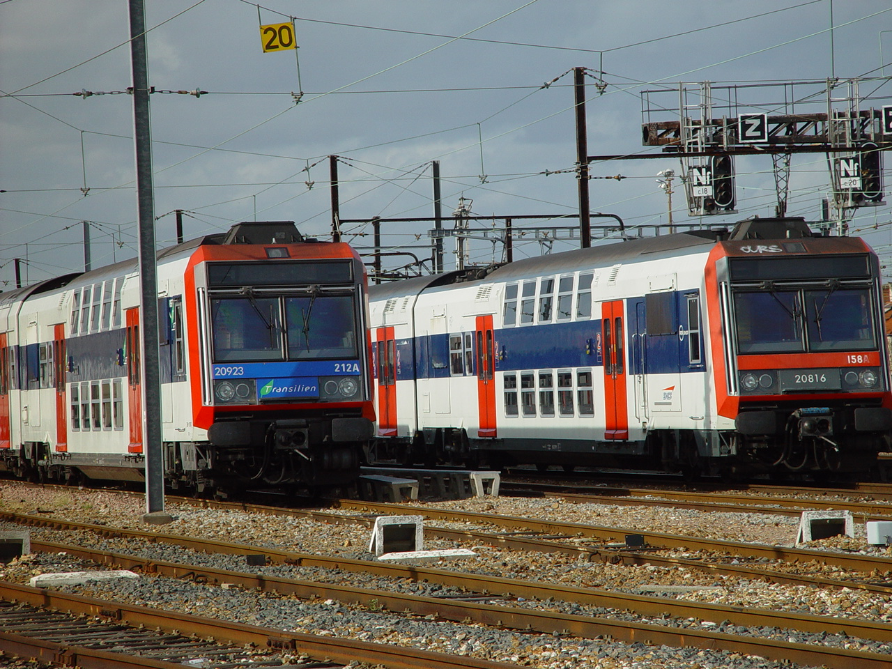 RER C à Brétigny-sur-Orge - photo Mehdi Ouici